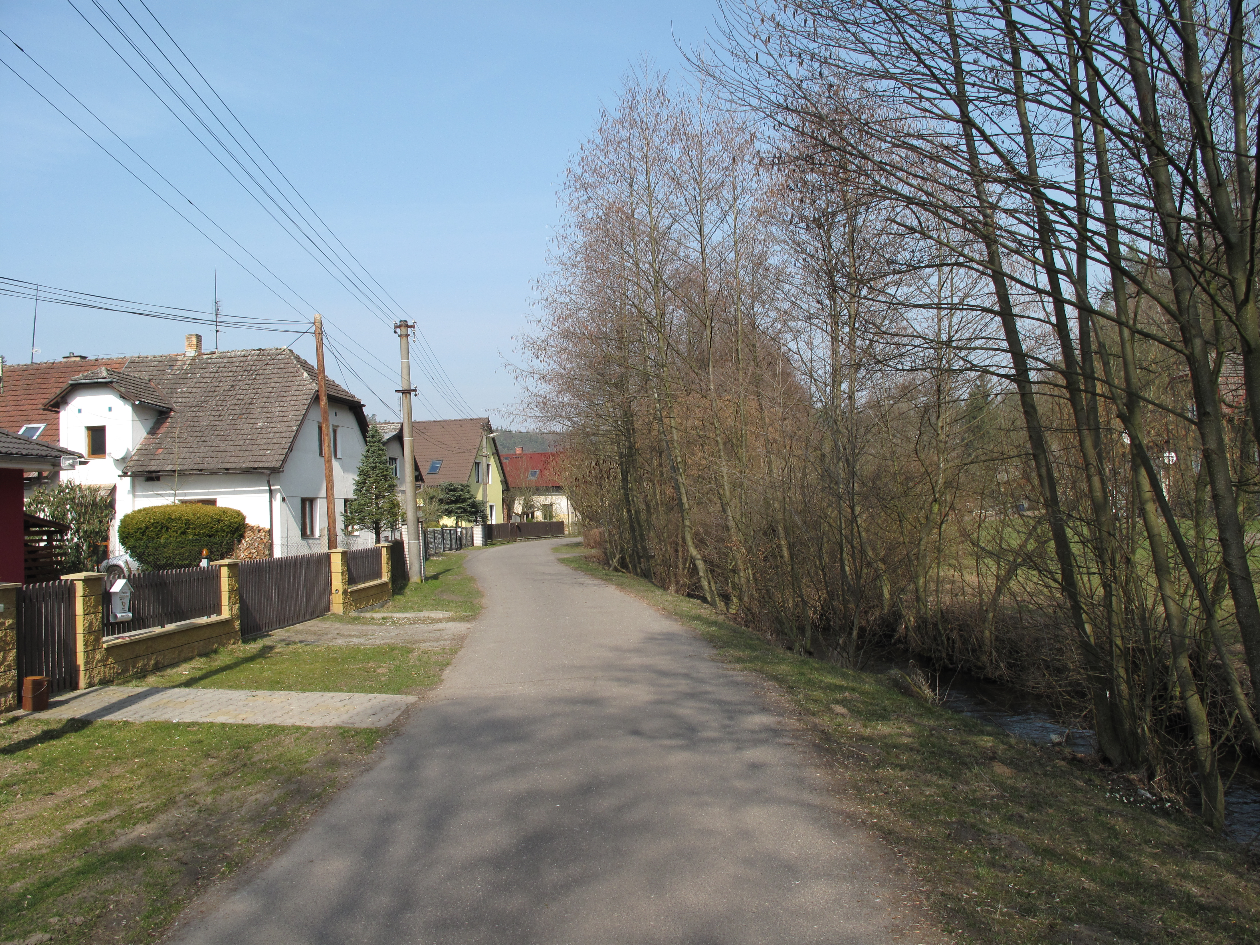 Cesta v Dolní Bukovině. Okres Mladá Bolesav, Česká republika.